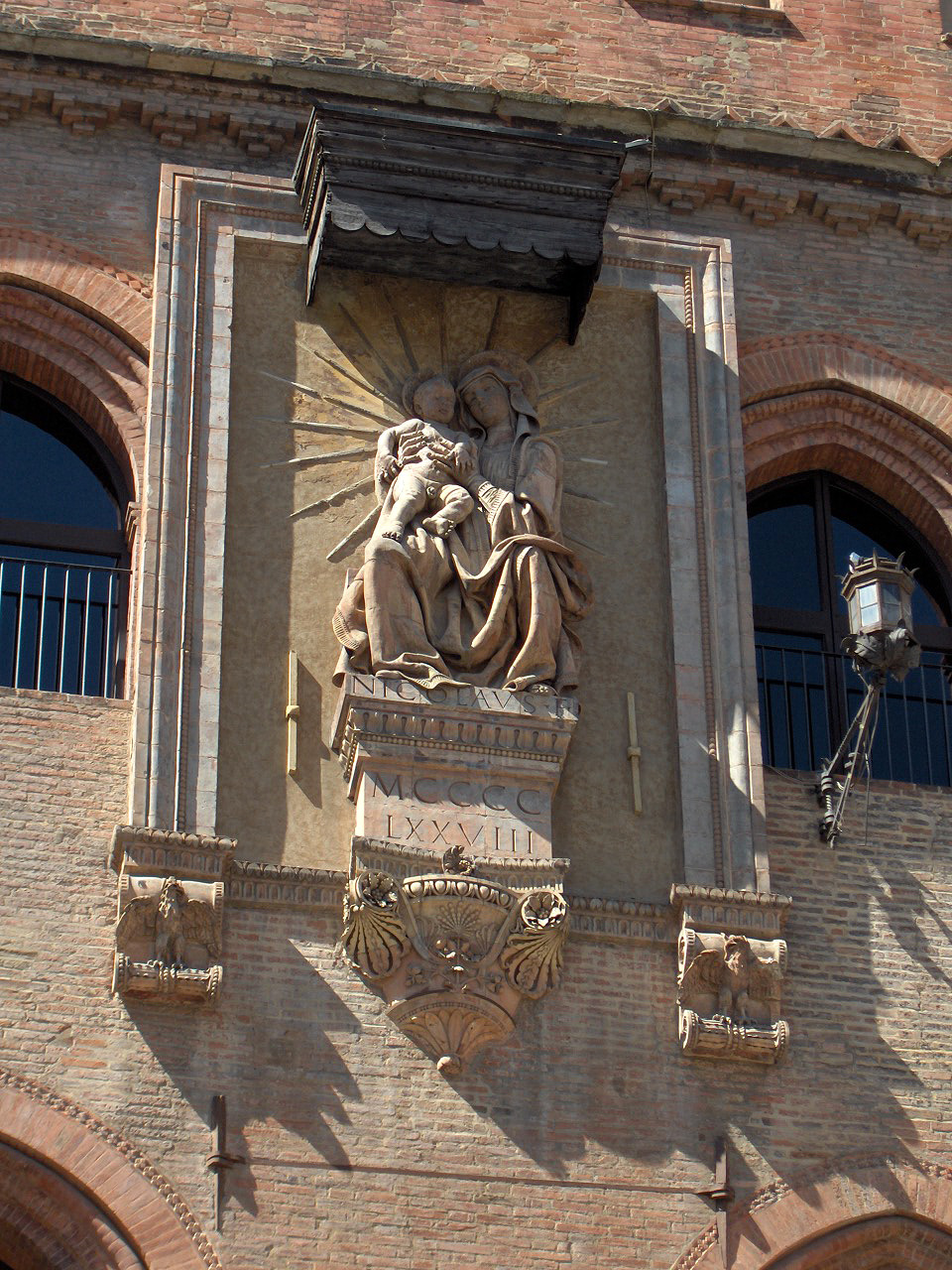 Madonna of the Square, terracotta by Niccolò dell'Arca (1478) on the Palazzo d'Accursio (Bologna), Italy